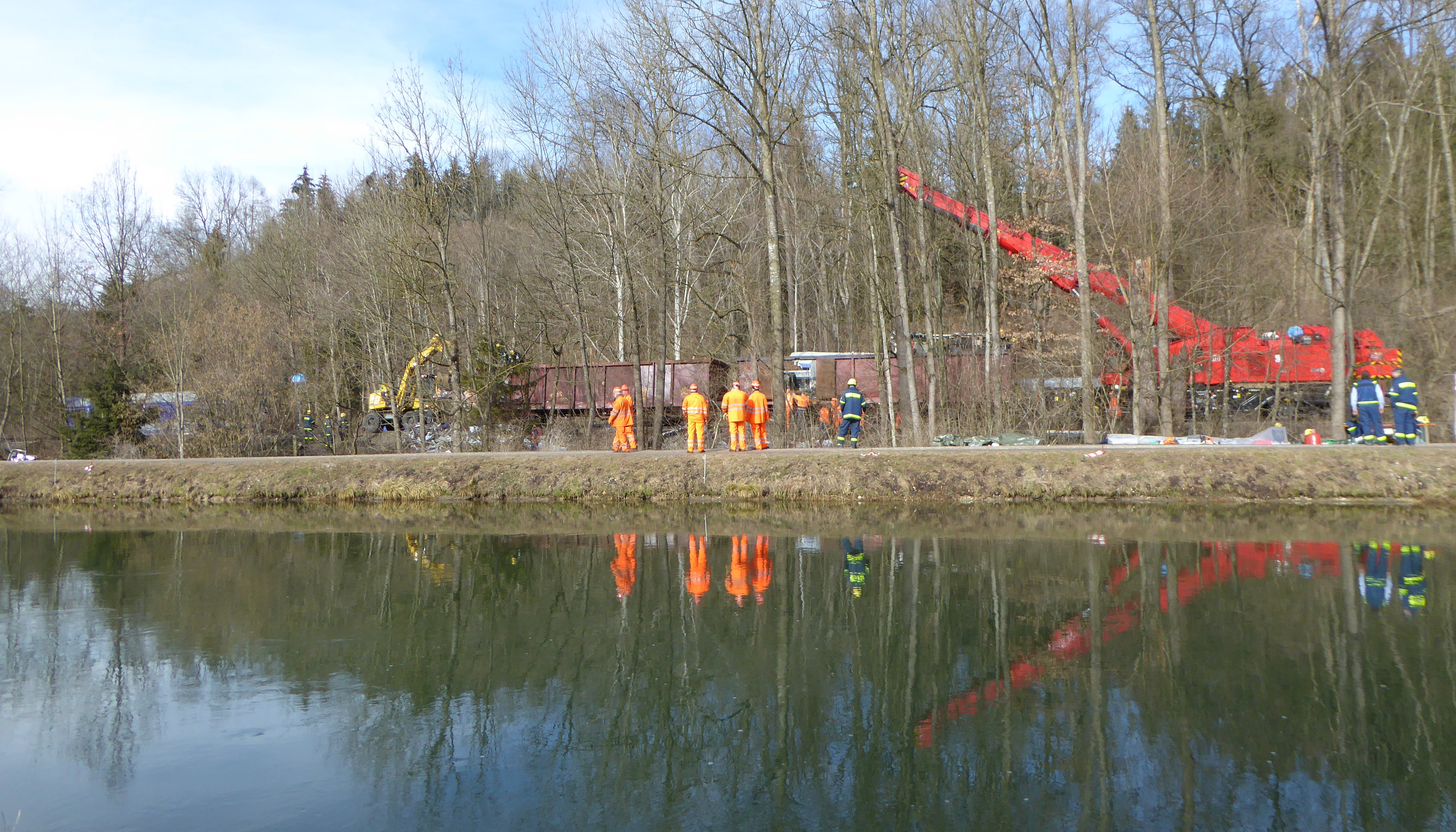 Bergung der Trümmer der am 2016-02-09 verunglückten Meridian-Züge westlich von Kolbermoor am Ufer des Mangfall­kanals. Links hinter Bäumen ein weniger beschädigter Wagen.